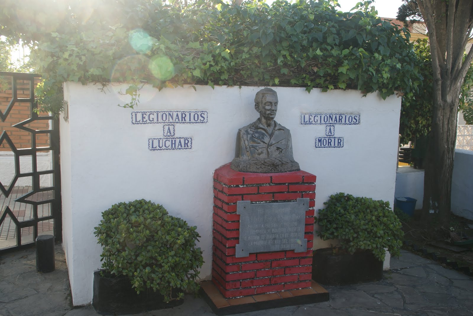 Busto del teniente Mario Emilio Muñoz Díaz, jefe de la 2ª Sección de la 22ª Compañía de la VIª Bandera, Medalla Militar Individual, muerto en el Frente del Ebro en 1939